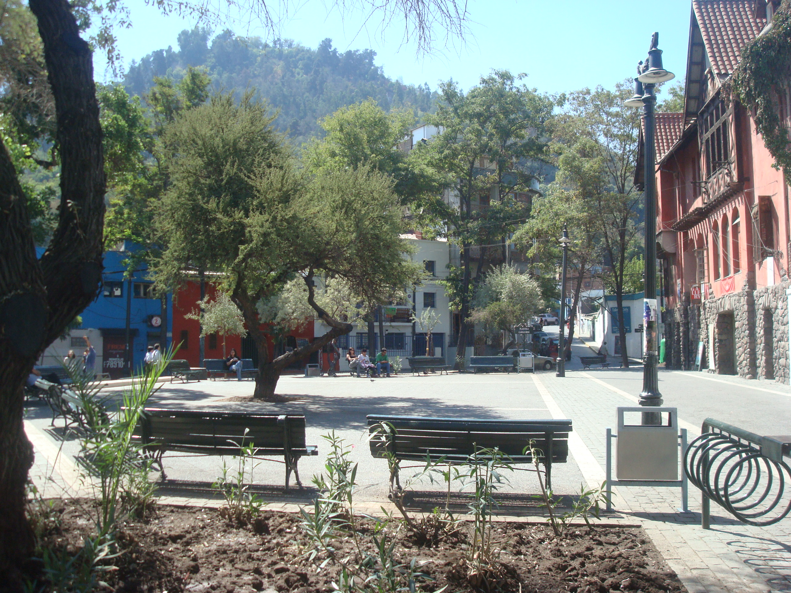 Plaza Camilo Mori, Providencia, Santiago de Chile